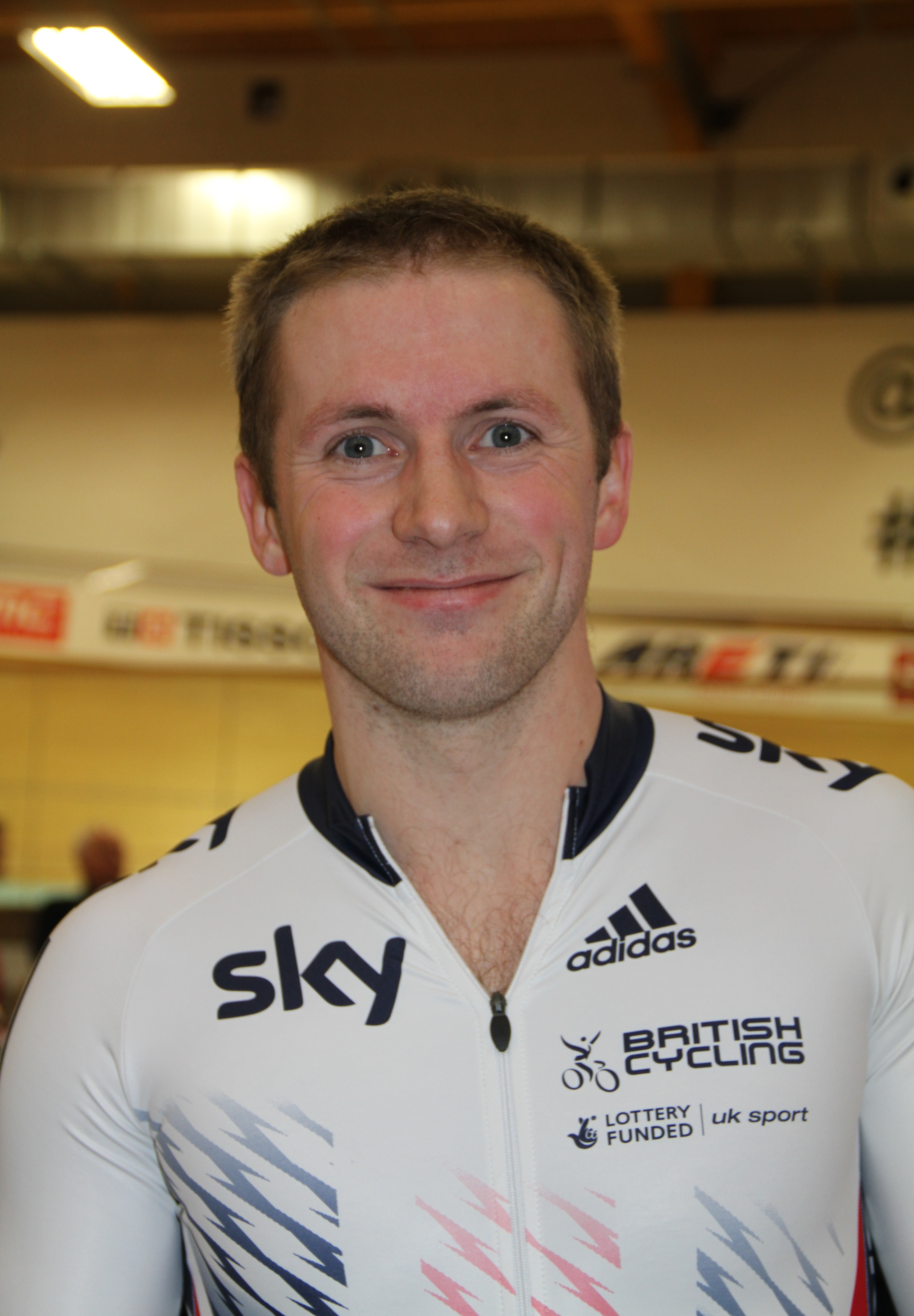 Jason Kenny, britischer Radsportler The making of this document was supported by the Community-Budget of Wikimedia Germany.